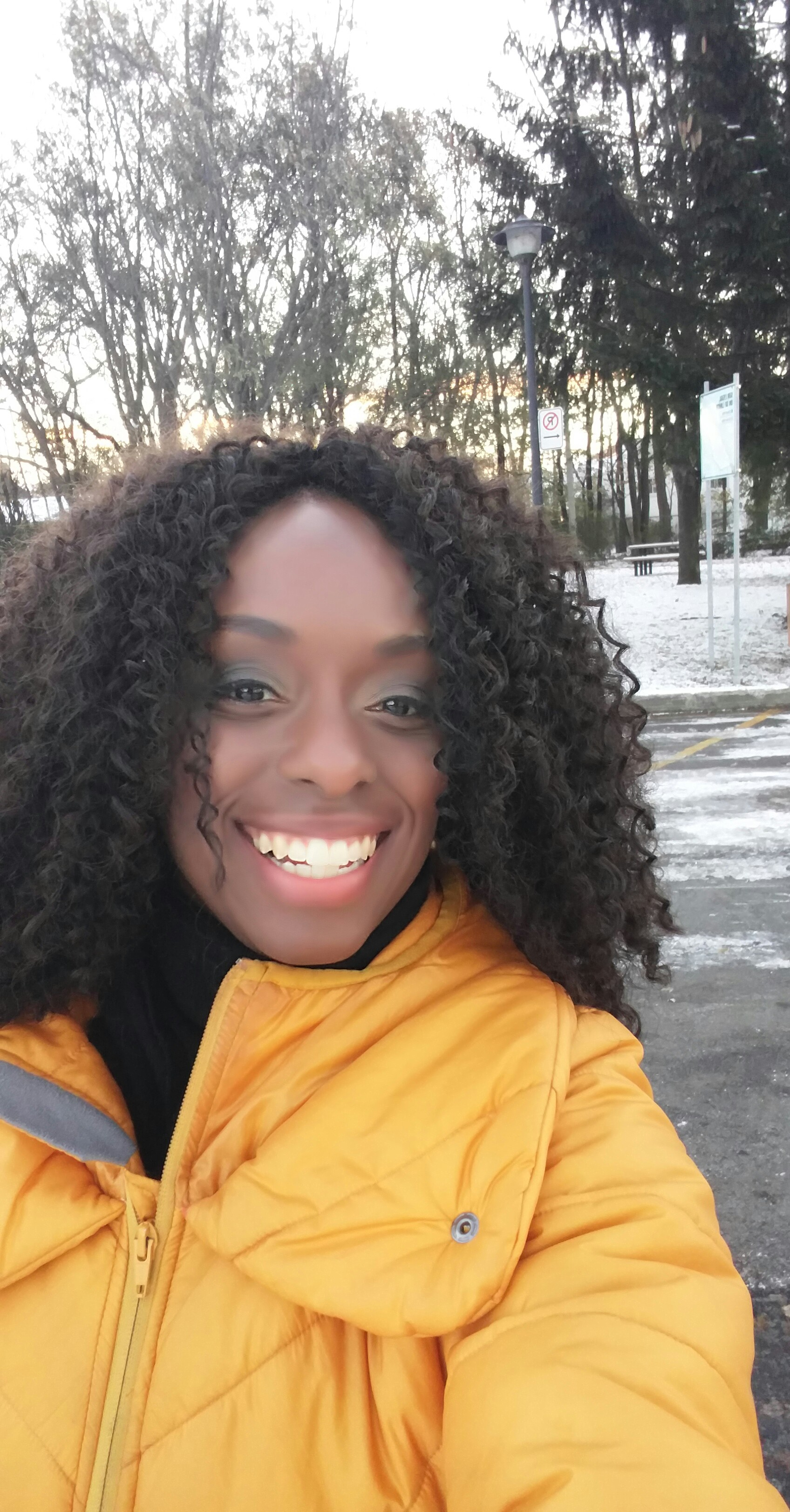 Tournage en hiver